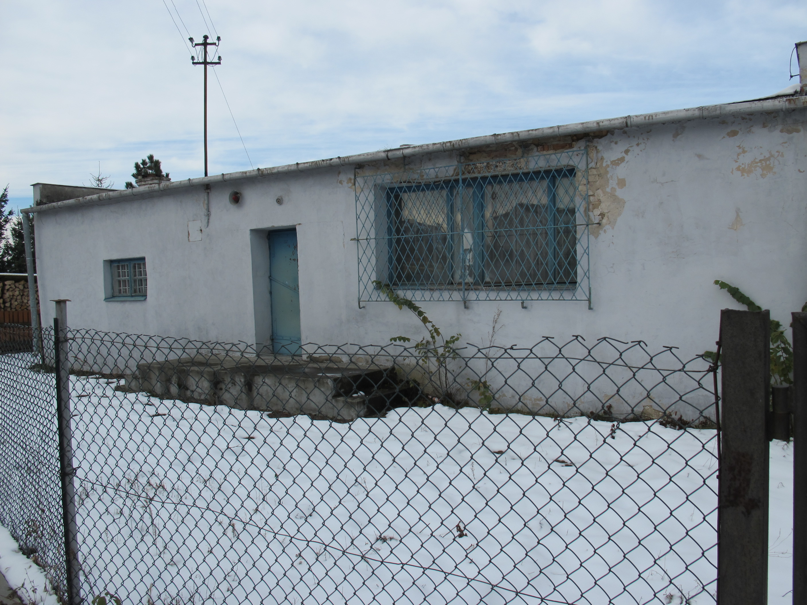 בניין מקווה הטהרה ששימשה את יהודי דליוגושיודלו.